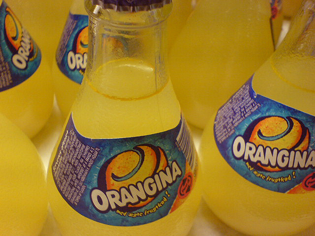 Fra samme butik